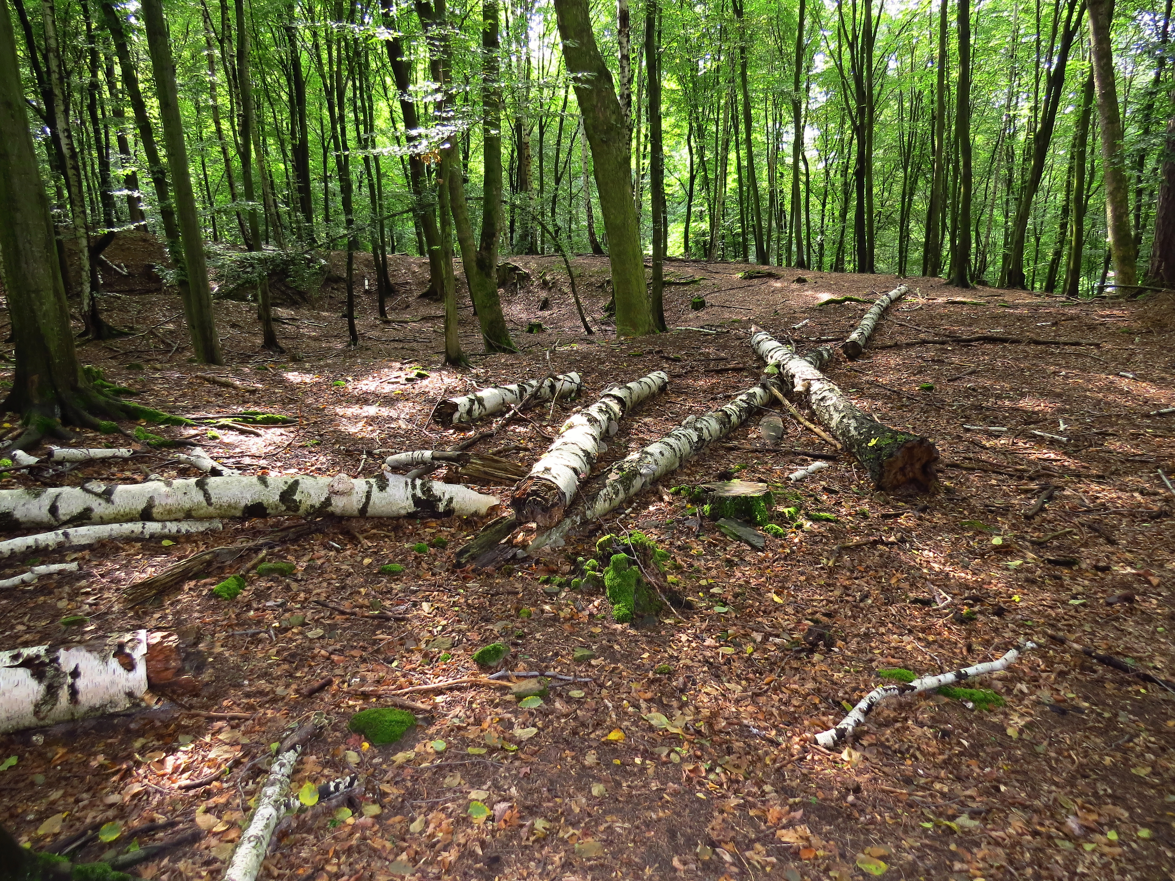 Project: Chráněná území.